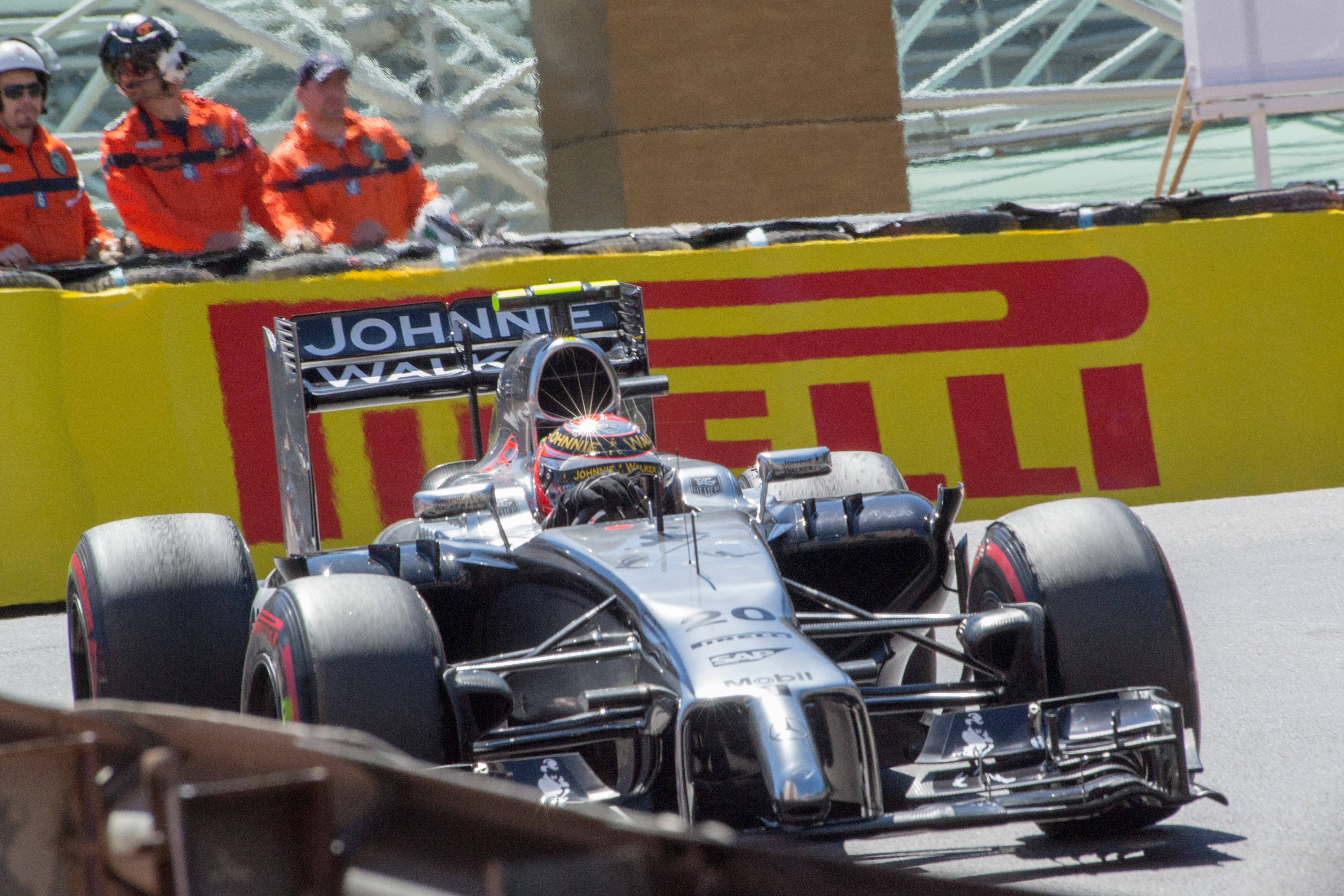 Kevin Magnussen, McLaren-Mercedes - 2014 Monaco Grand Prix